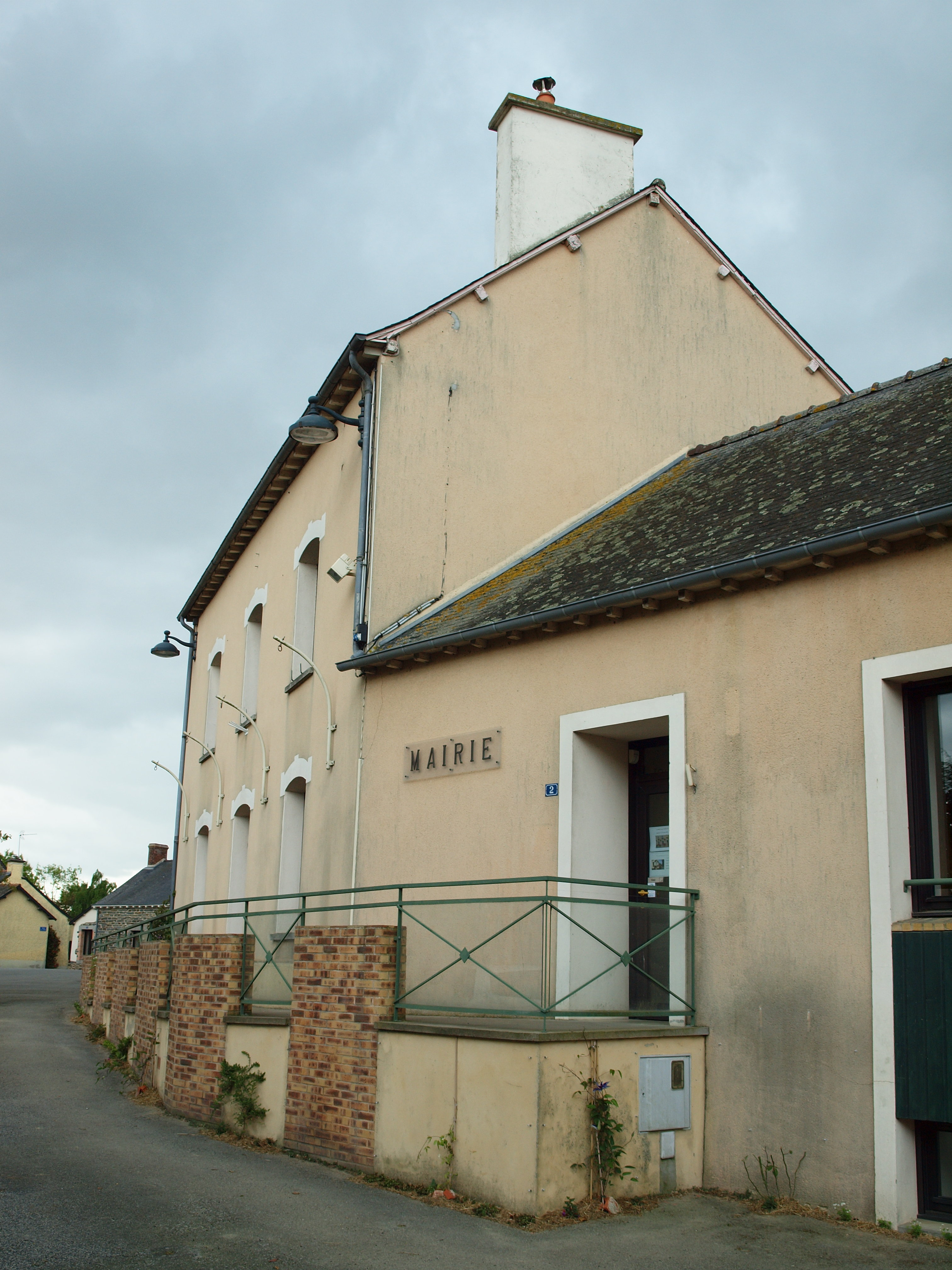 Boistrudan (Ille-et-Vilaine, France)